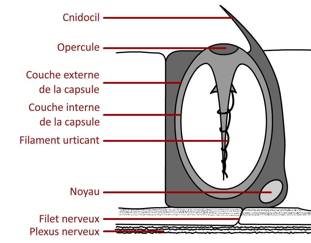 Schéma d'un cnidocyte